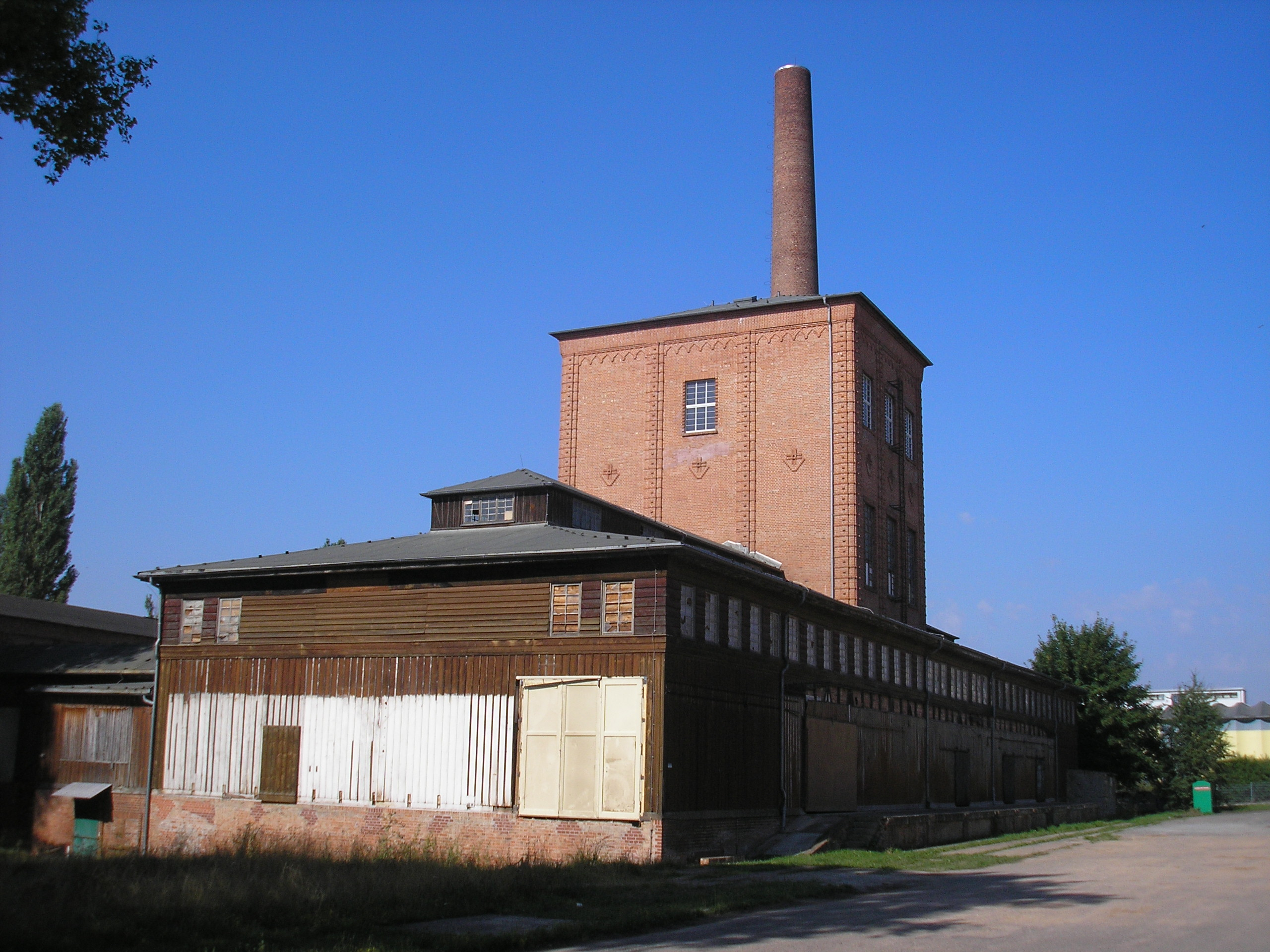 Die ehemalige Saline in Artern (Thüringen).